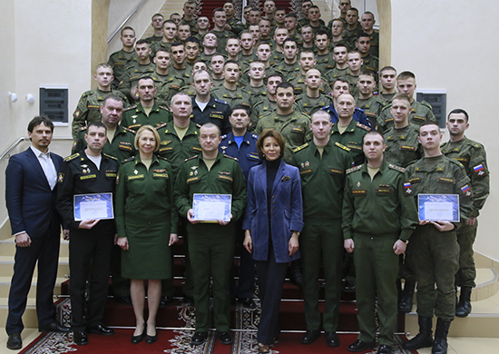 Кандидат исторических наук Вероника Крашенинникова в Военном университете Министерства обороны Российской Федерации